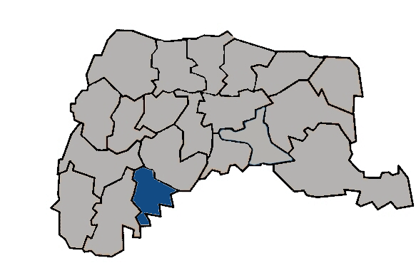 台灣省雲林縣北港鎮 KaurJmeb於2005年1月28日為編輯zh:北港鎮所繪製